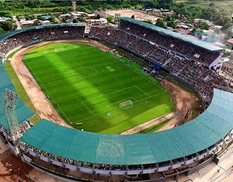 Vista aérea (dron) del escenario deportivo central de Yacuiba.